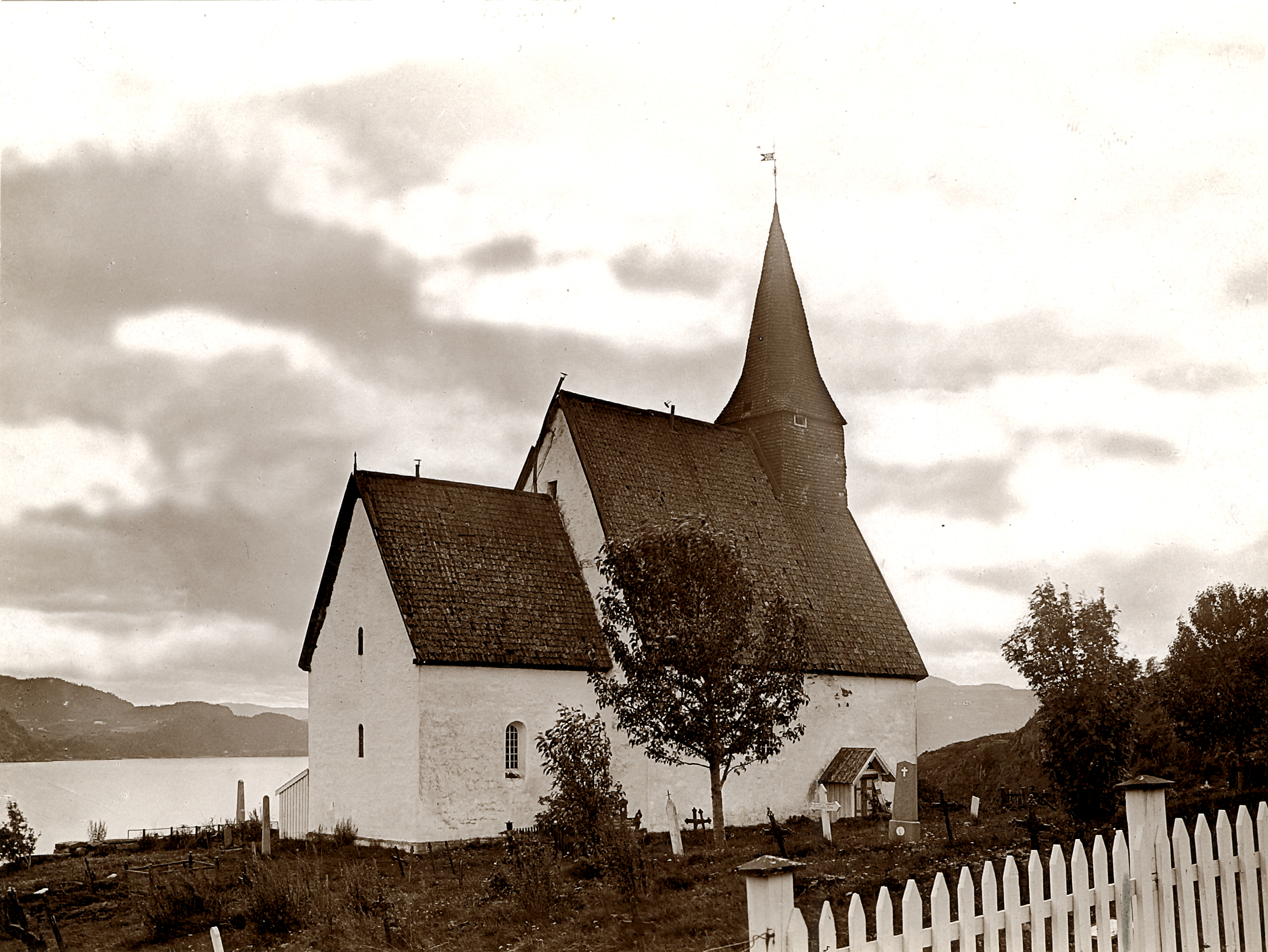 Byneset kirke i Byneset, Sør-Trøndelag